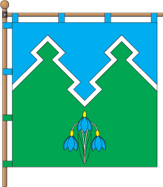 Прапор Могилівської ОТГ (Дніпропетровська область)